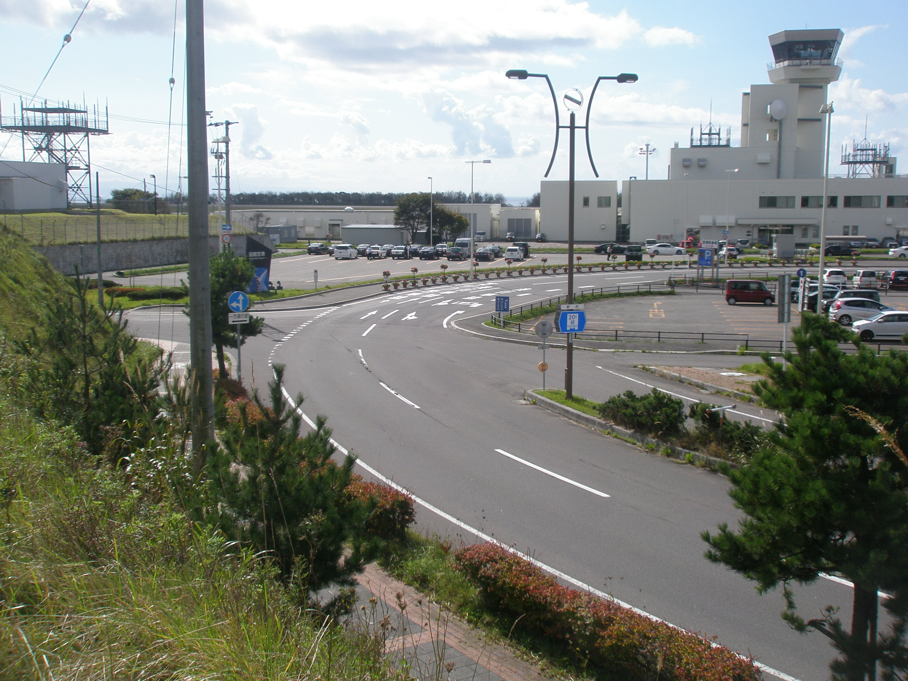 北海道道63号函館空港線・起点-2（終点側から）